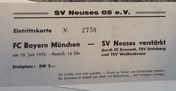 Eintrittskarte SV Neuses gegen FC Bayern